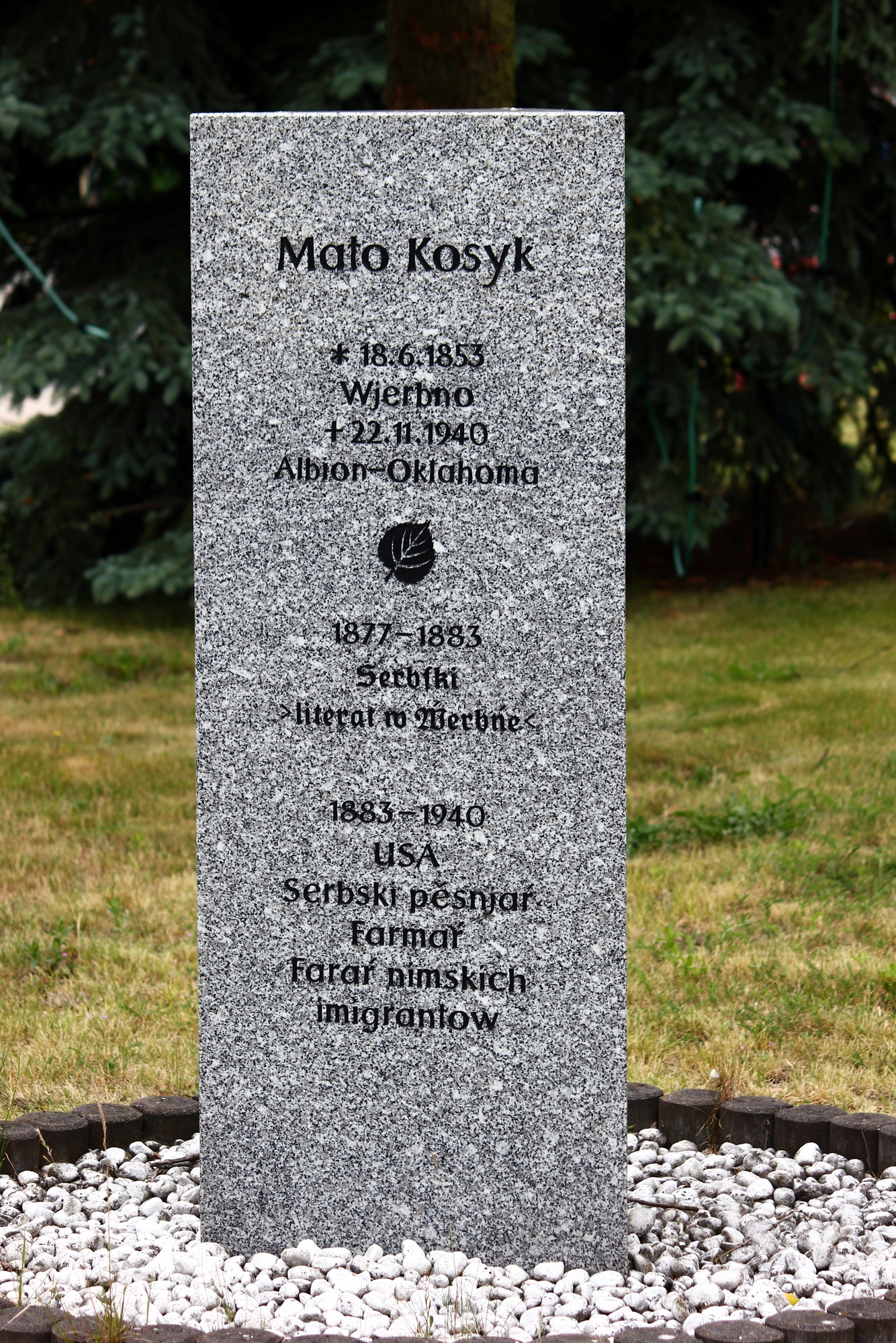 Hornjoserbsce: Pomnik Mata Kosyka we Wjerbnje.